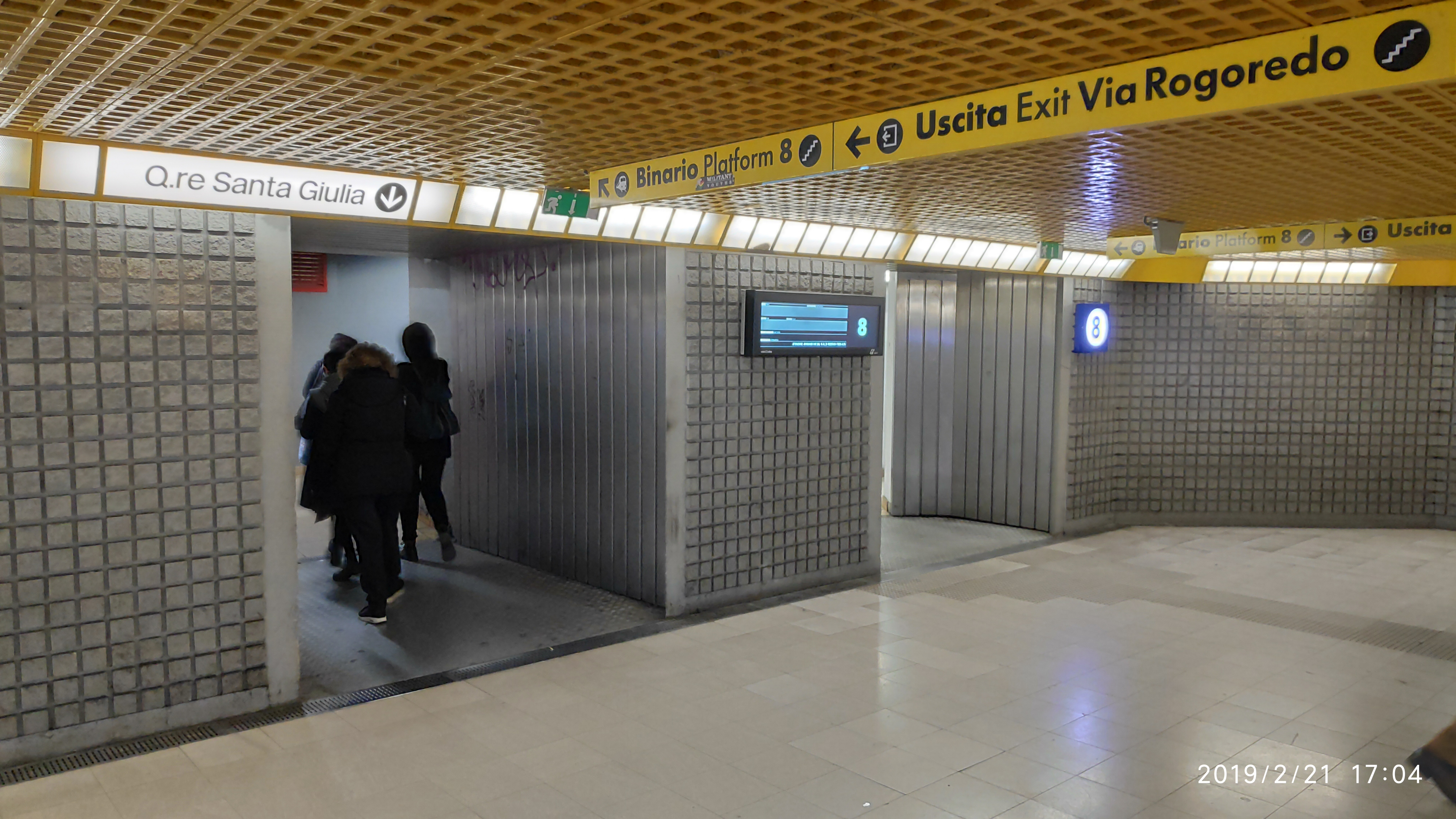 uscita quartiere Santa Giulia alla stazione metropolitana di Rogoredo a Milano (2019)